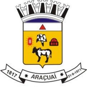 Brasão da cidade de Araçuaí